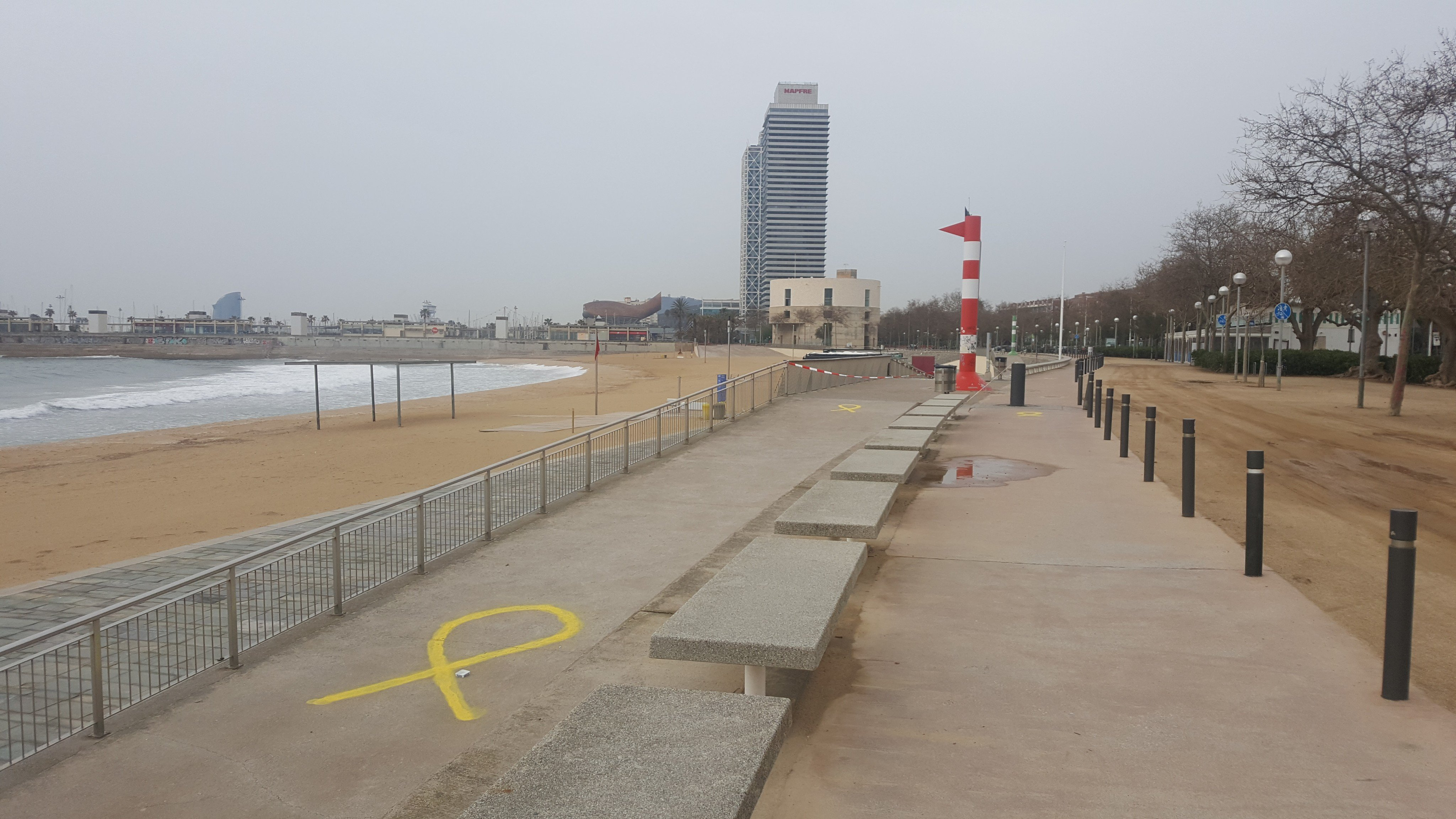 Platja de Nova Icària pel matí durant el confinament pel COVID19